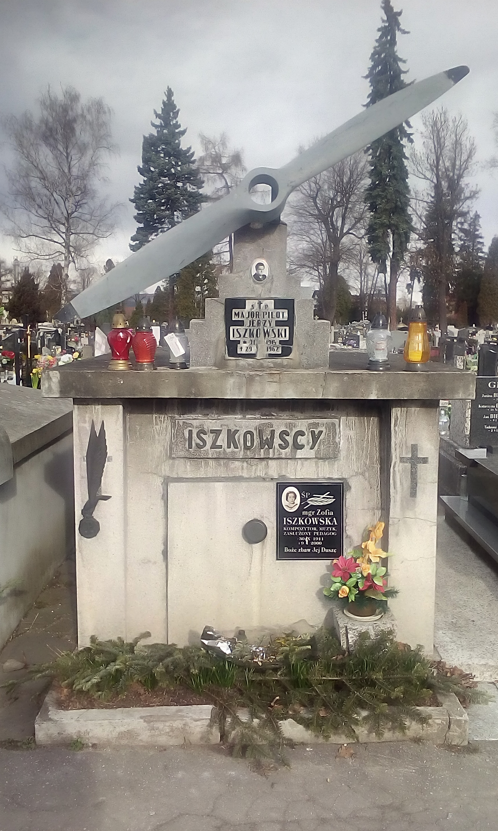 Grobowiec rodziny Iszkowskich na Katolickim Cmentarzu Komunalnym przy ul. Rejtana w Nowym Sączu